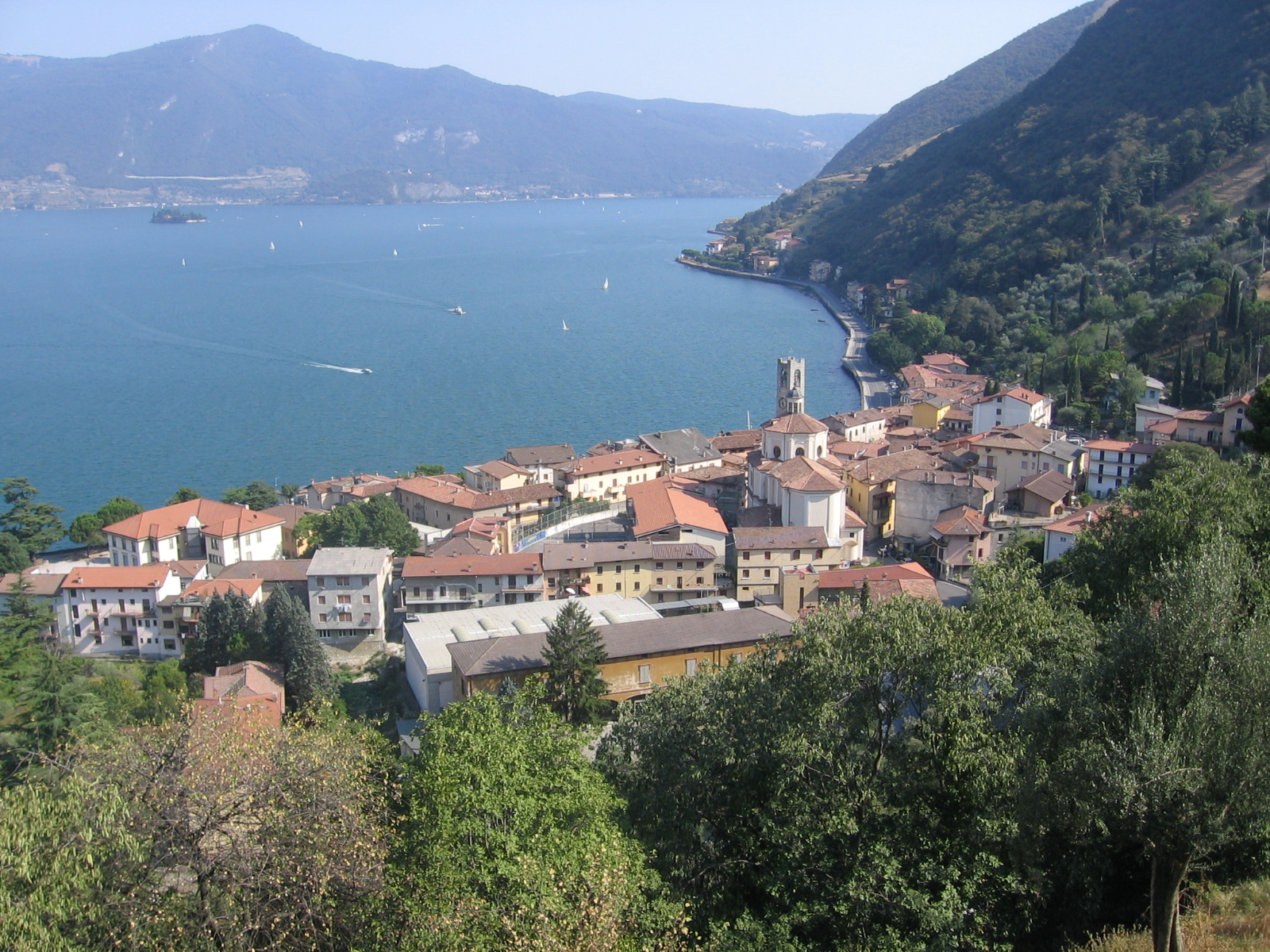 Tavernola bergamasca, Bergamo, Italy